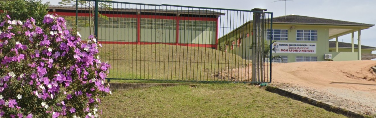 Escola Municipal de Ensino Fundamental D. Afonso Niehues